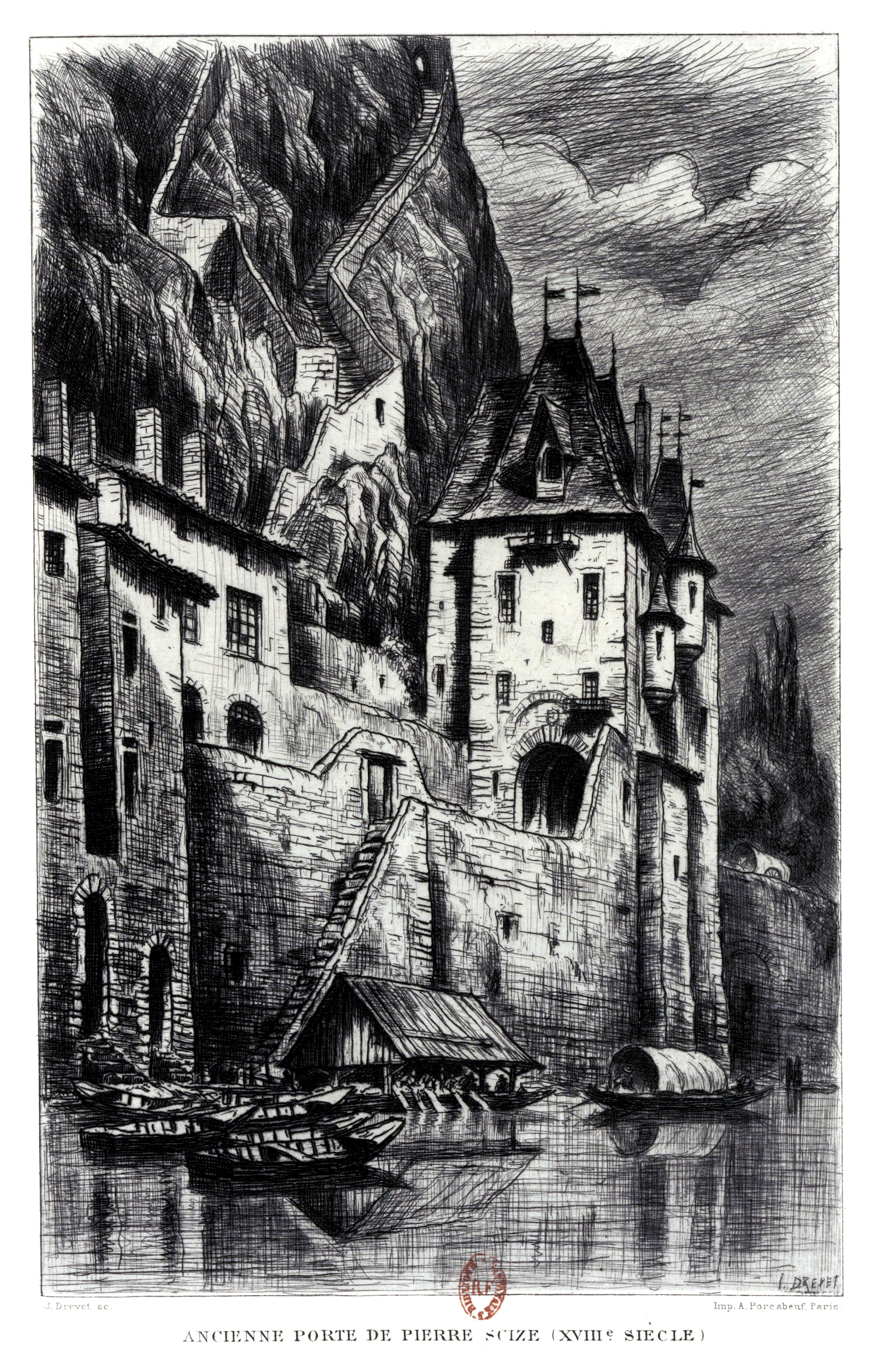 Lyon, « Ancienne porte Pierre Scize (XVIIIe s.) » sur la Saône, en rive droite, vue vers l'amont ; au pied du château de Pierre Scise vers lequel on grimpait par l'escalier taillé dans le roc, montré sur la gravure. Eau-forte par Joannès Drevet dans Emmanuel Vingtrinier (1901), Le Lyon de nos pères, planche 19, p. 296. (Les autres eaux-fortes dans le livre, du même artiste, sont listées dans la page « Classement des eaux-fortes », avec une catégorie sur Commons.)